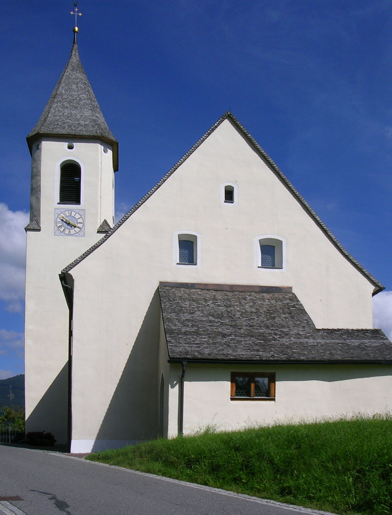 Kirche „Maria Empfängnis“ am Innerberg